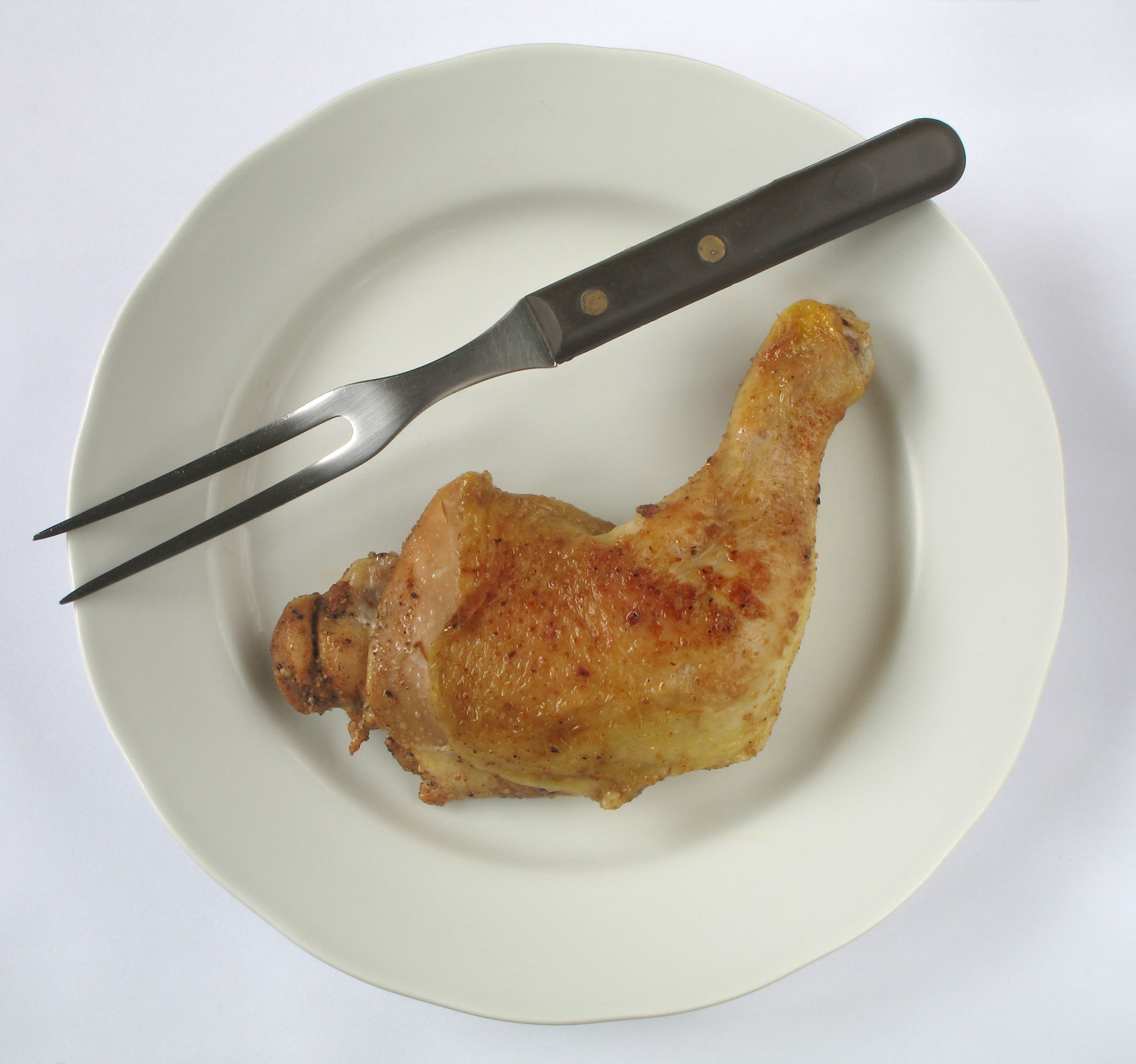 Hühnerkeule (gebraten) - cuisse de poulet